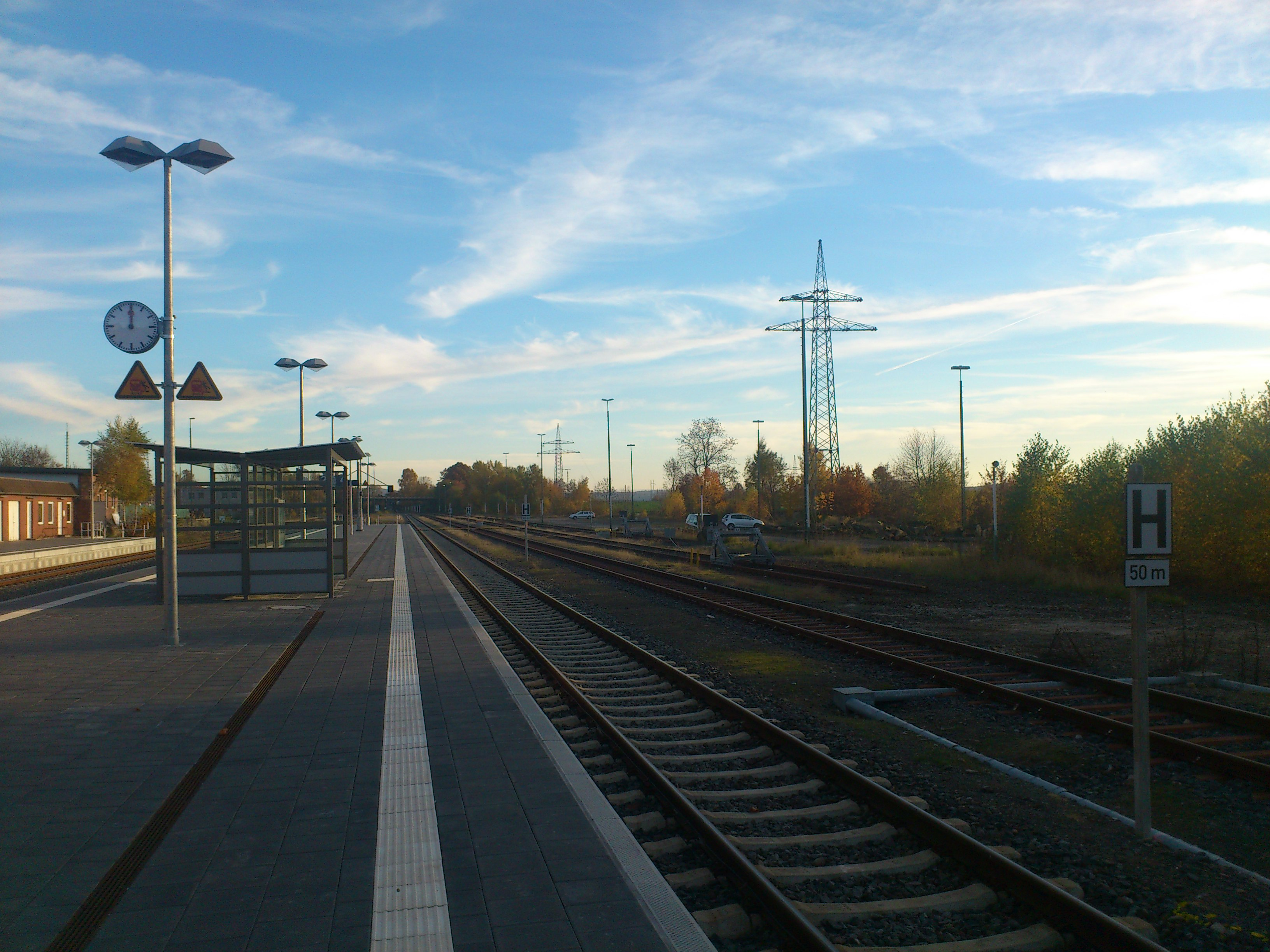 Bahnhof Herzberg (Harz): Blick vom Inselbahnsteig (Gleise 2 & 4) auf den ehemaligen Rangierbahnhof, auf dem gerade ein Hochspannungsmast für eine neue Leitung zwischen den Umspannwerken Pöhlde und Herzberg errichtet wurde.